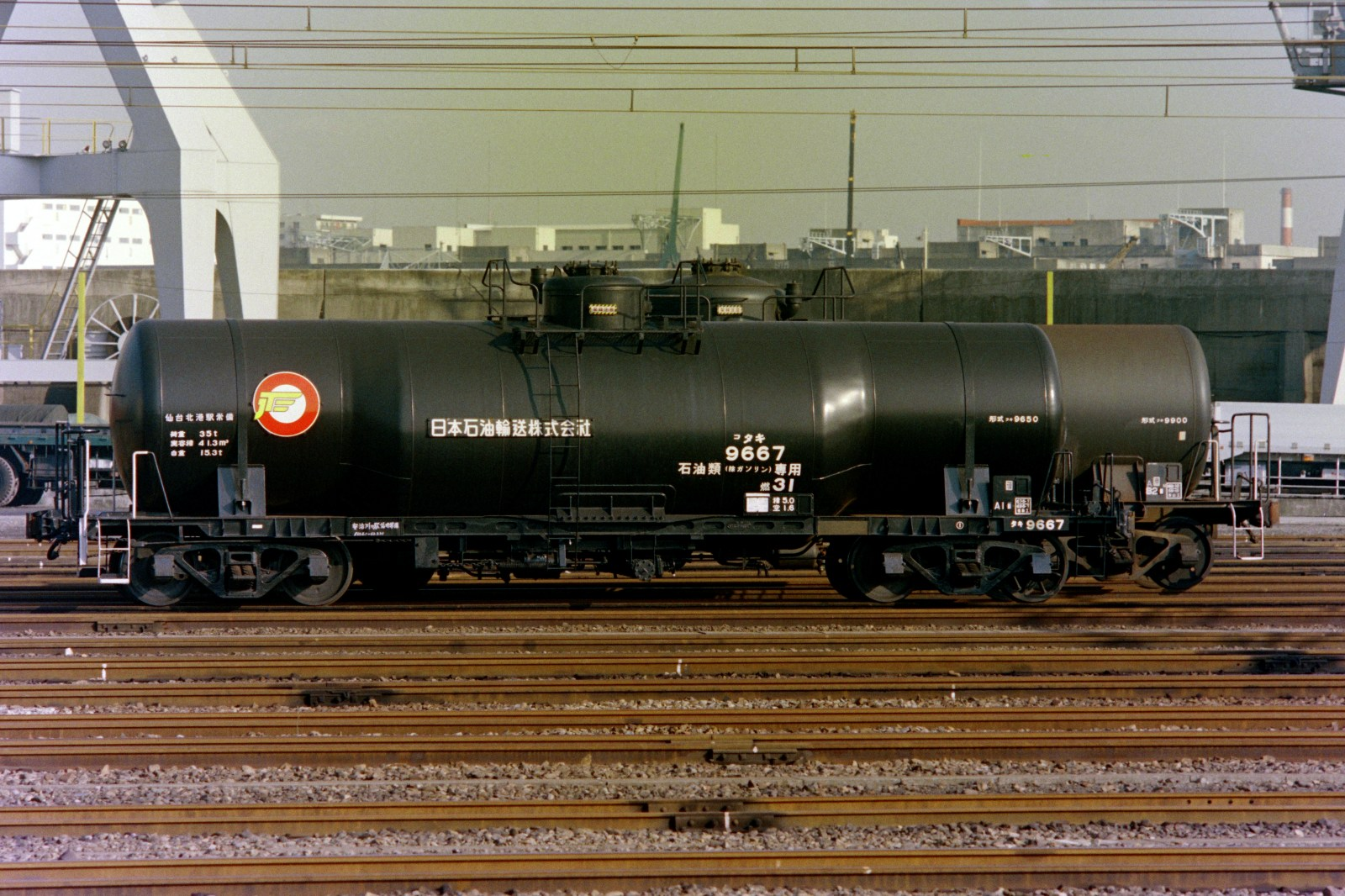 タキ9650形タキ9667。日本石油輸送所有。安治川口駅にて。